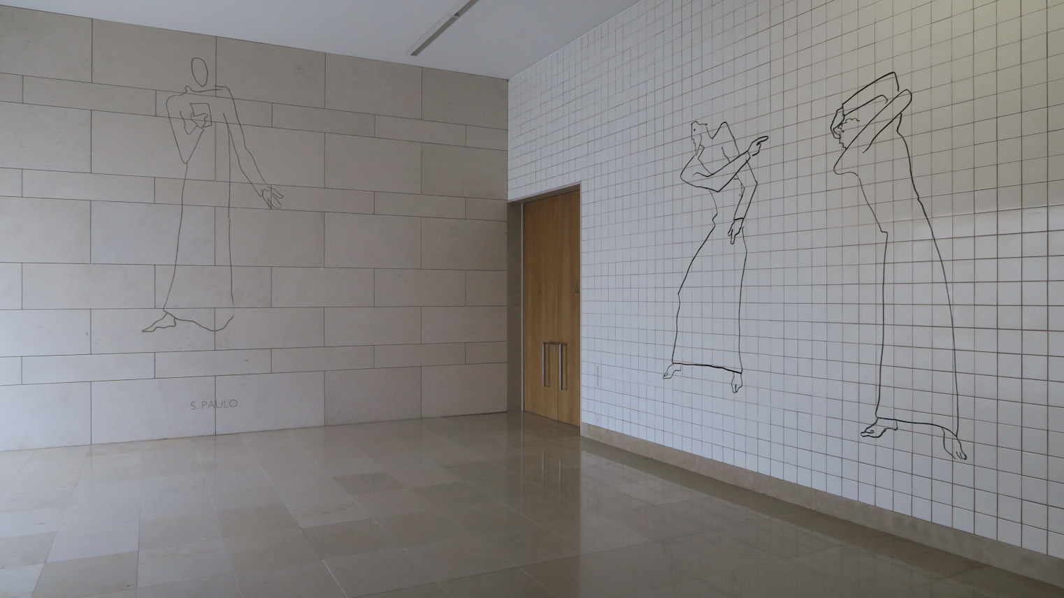 Painel de Azulejos de Siza Vieira, Galilé dos Apóstolos São Pedro e São Paulo, Santuário de Fátima